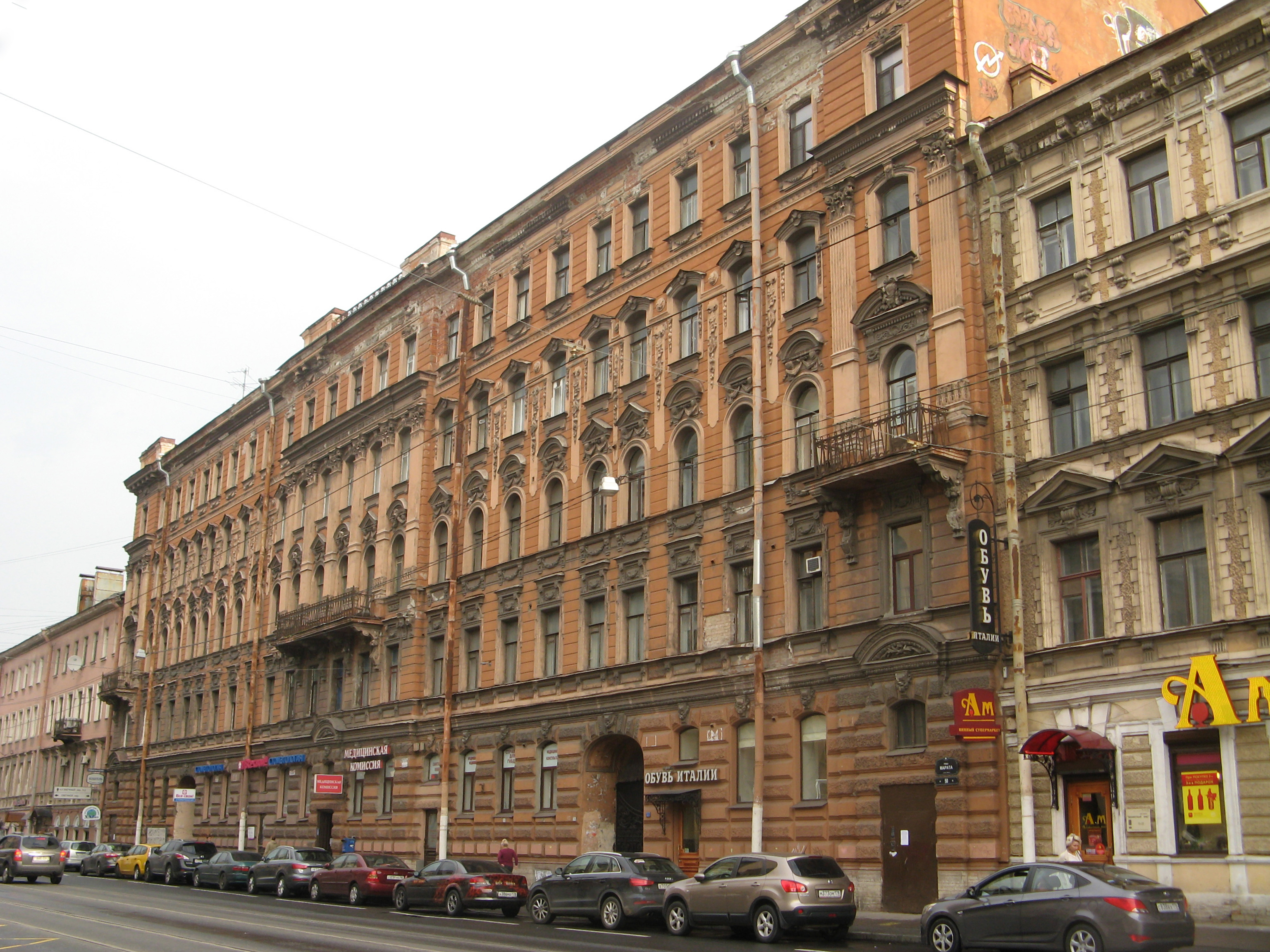 Дом, где в 1884-1903 гг. жил музыкальный деятель Беляев М.П. и собирался кружок музыкантов и композиторов во главе с Римским-Корсаковым Н.А.: улица Марата, 50, Центральный район, Санкт-Петербург